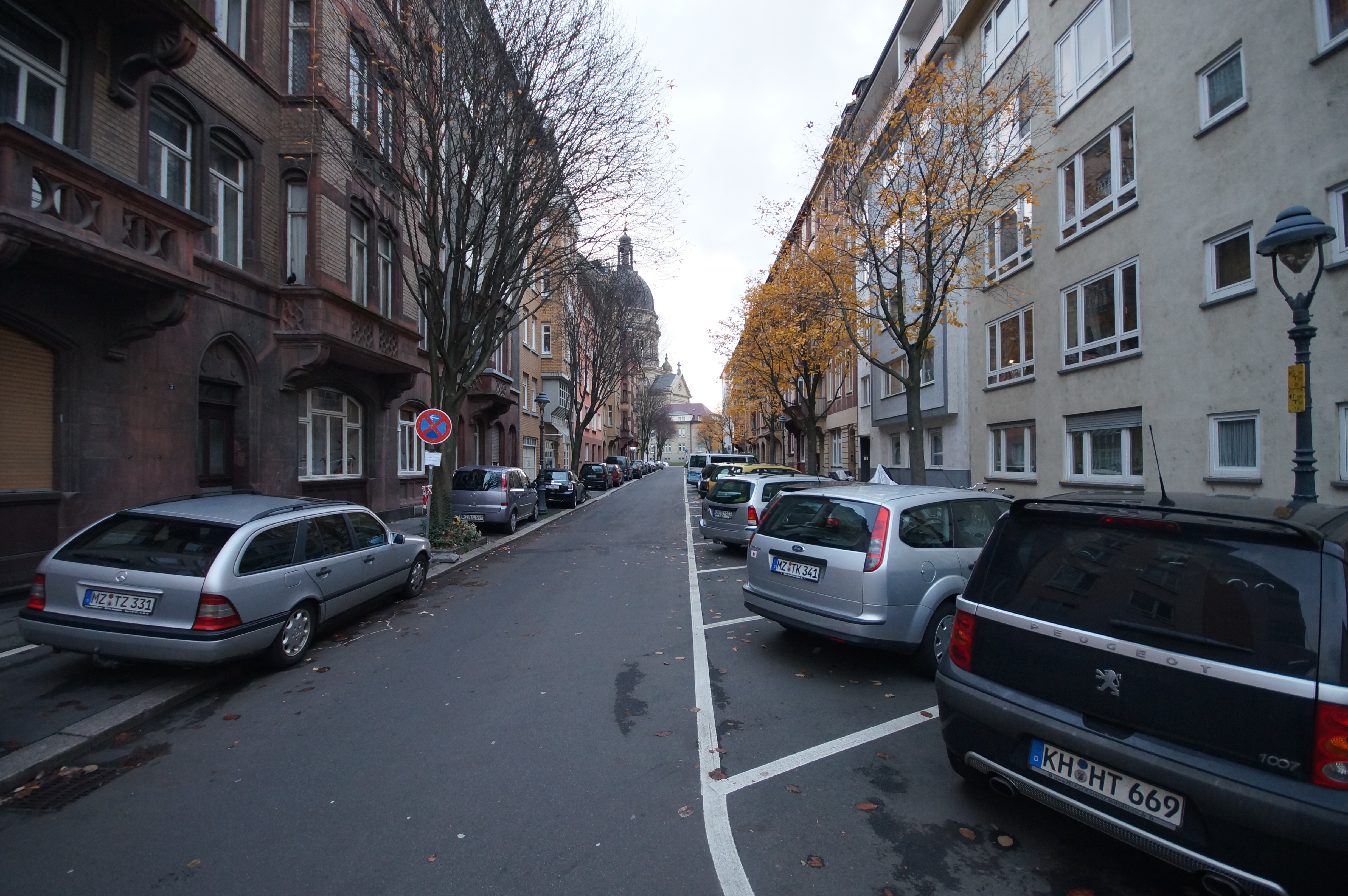 Die Albinistraße in Mainz von der Greiffenklaustraße Richtung Kaiserstraße. Im Hintergrund ist die Christuskirche zu sehen.